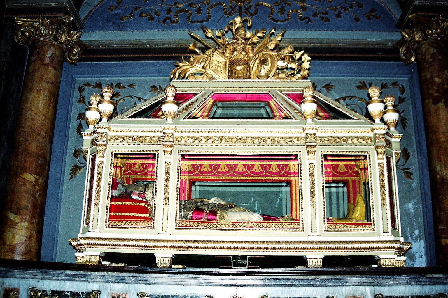 Fara Novarese (NO), Oratorio Scurolo di San Damiano: l'urna contenente il corpo del santo.